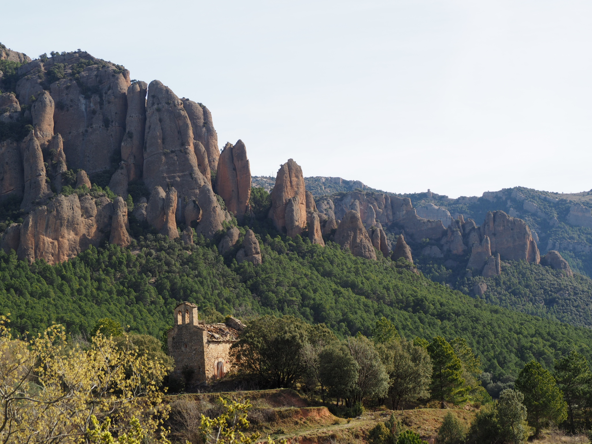 Serra de Turp i Móra Comdal - Valldan This is a a photo of a natural area in Catalonia, Spain, with id: ES510189